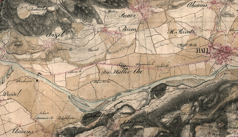 Haller Au, Inntal zwischen Innsbruck und Hall, um 1800